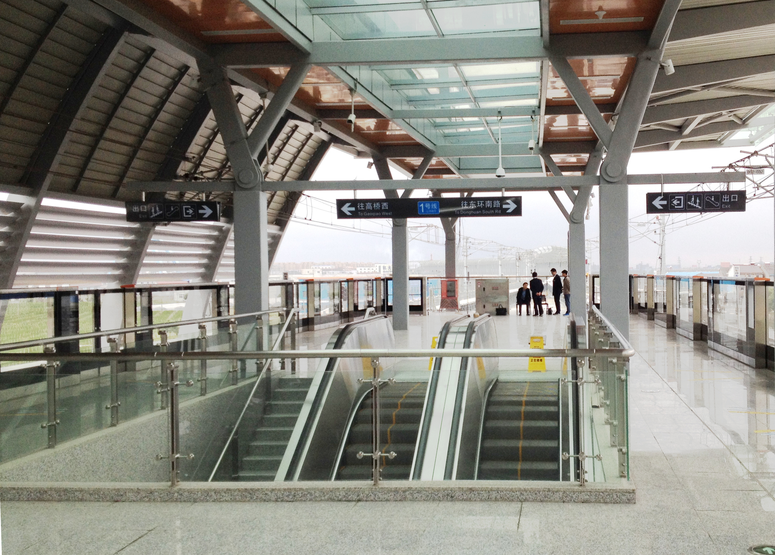 高桥西站站台，2014年5月10日（试运行）